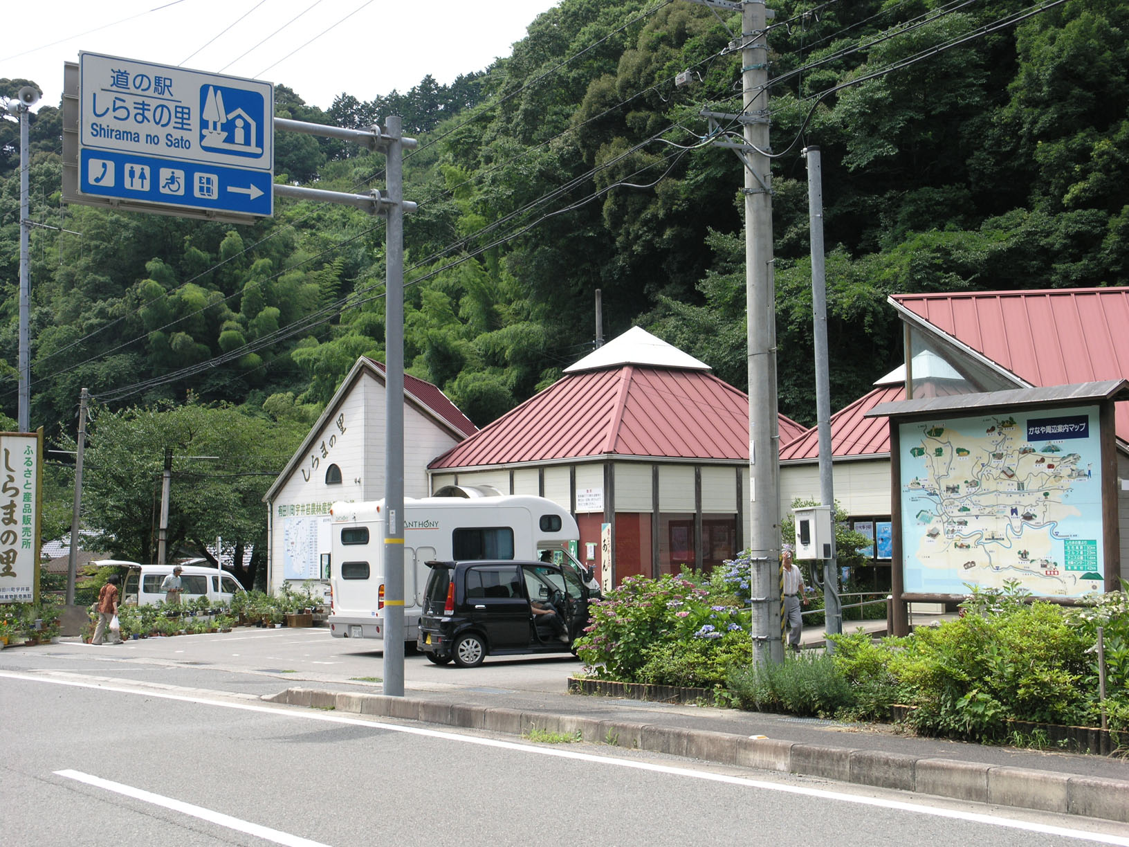 道の駅しらまの里 (和歌山県有田郡有田川町) 2008年8月撮影。 機材：C8080WZ 撮影者：Kansai explorer